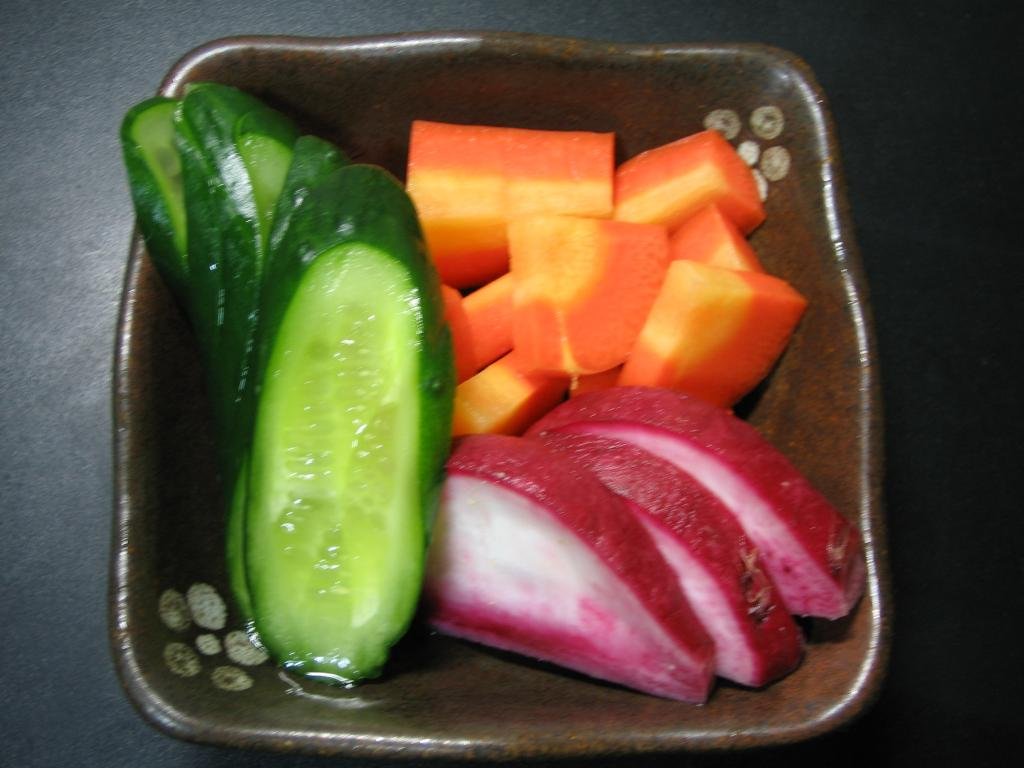 Nukazuke(ぬか漬け).